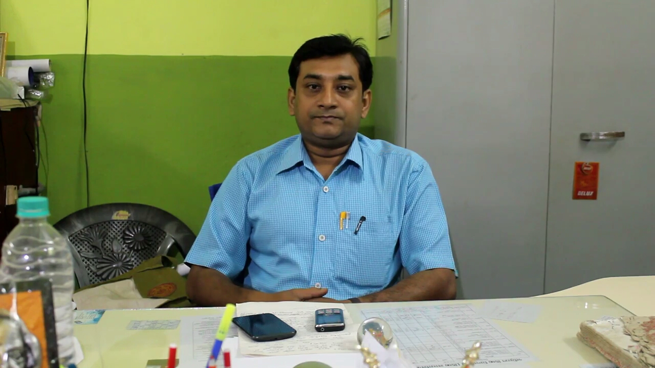 (সঞ্জয় মন্ডল)গরিফা উচ্চ বিদ্যালয়ে বর্তমান প্রধান শিক্ষক